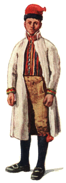 Folkdräkt från Nås socken (Dalarna)